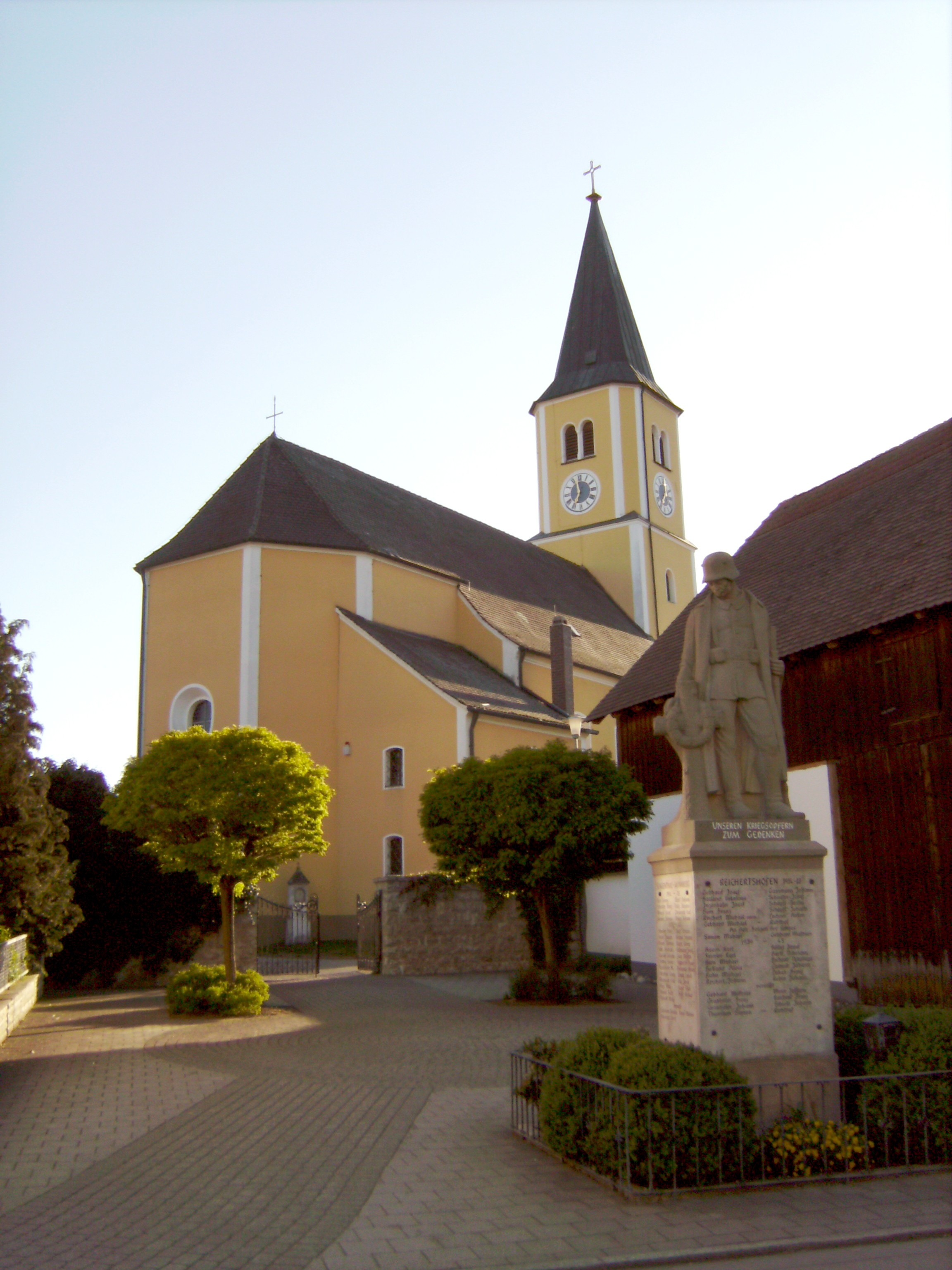 kirche